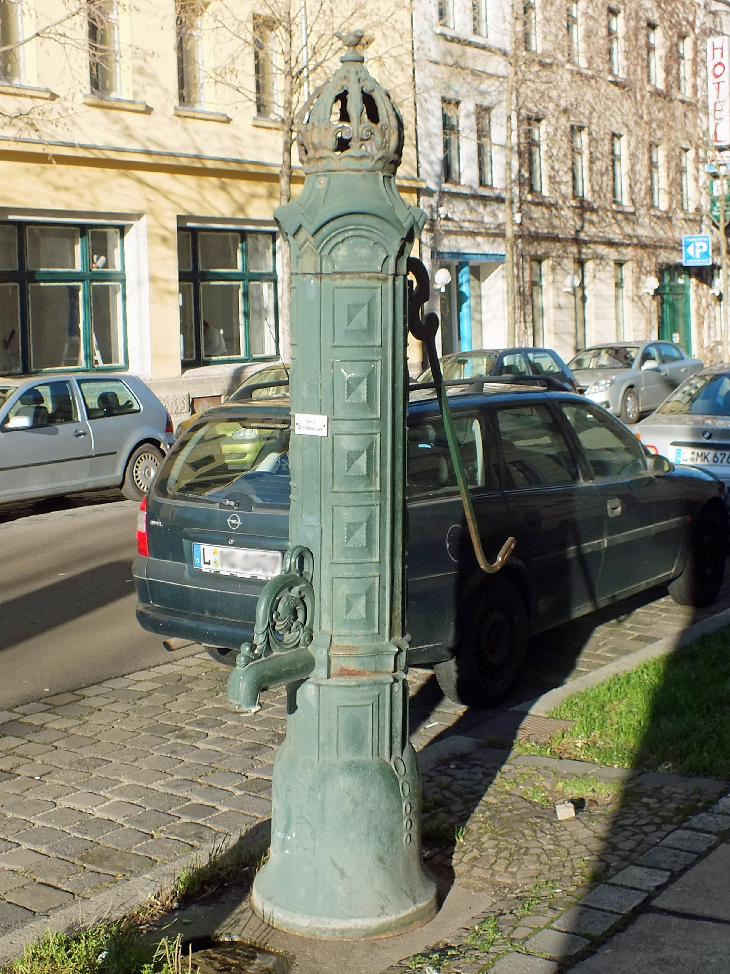 Restaurierte Handschwengelpumpe in der Hedwigstraße in Leipzig